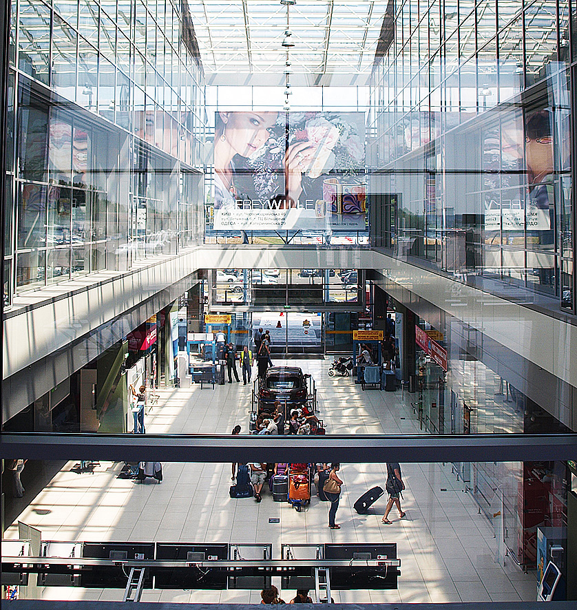 Зал очікування в Жулянах